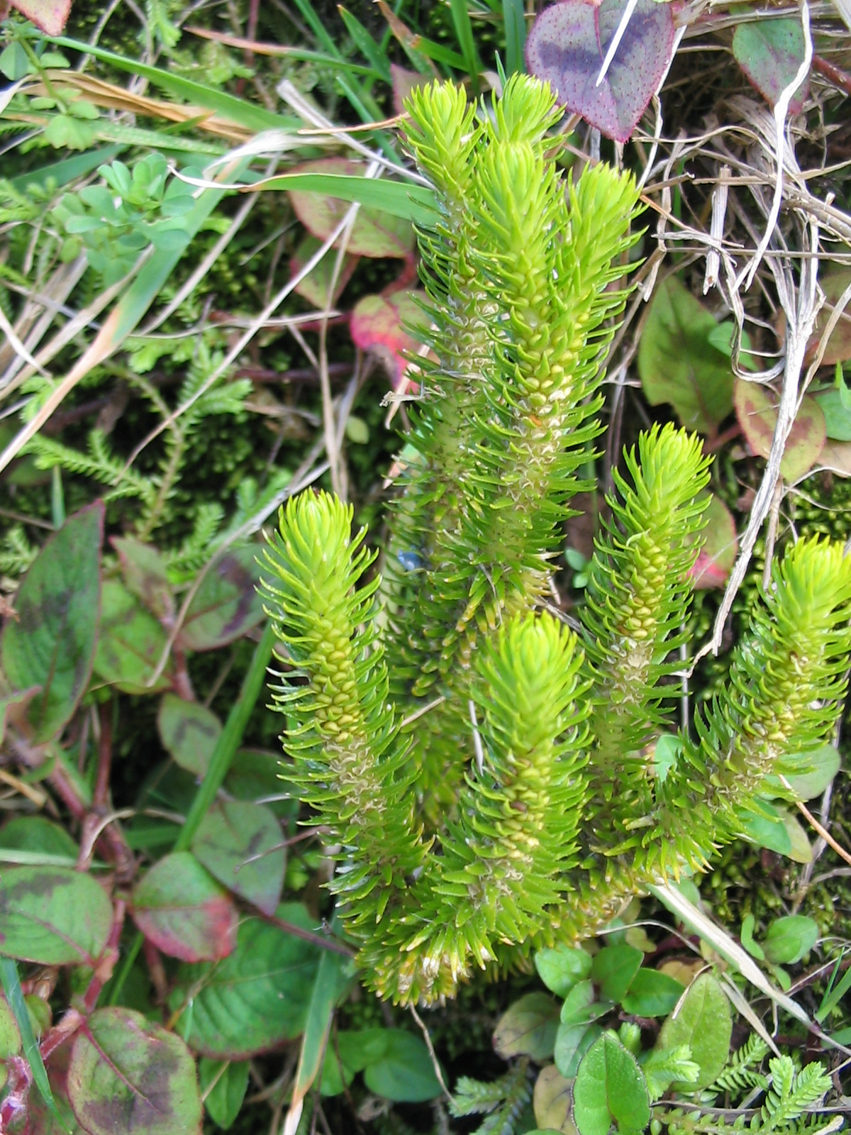 Gezähnter Bärlapp (Huperzia dentata) - Habitus